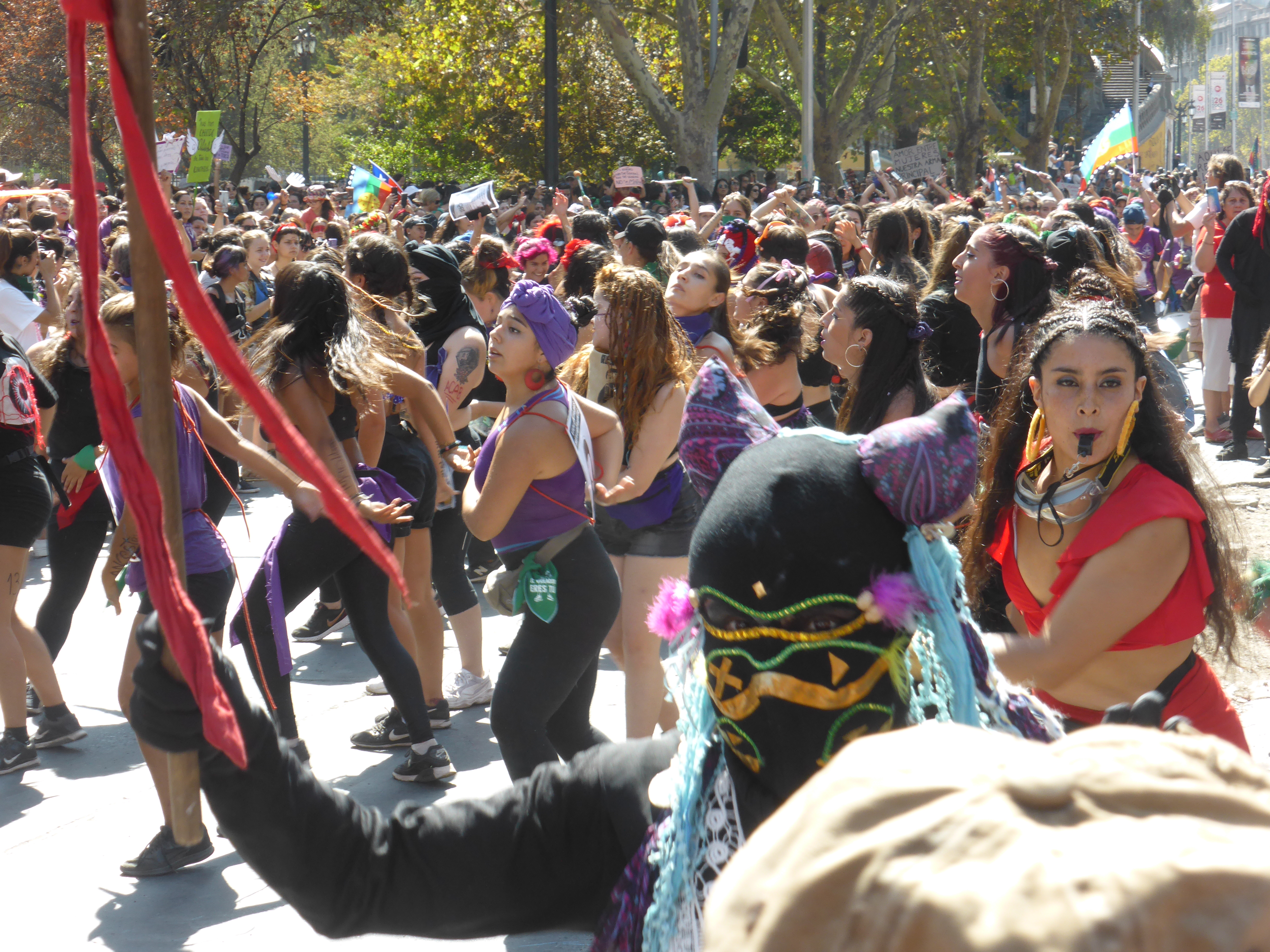 Marcha del Día de la Mujer, en Santiago de Chile. En la céntrica avenida Alameda.